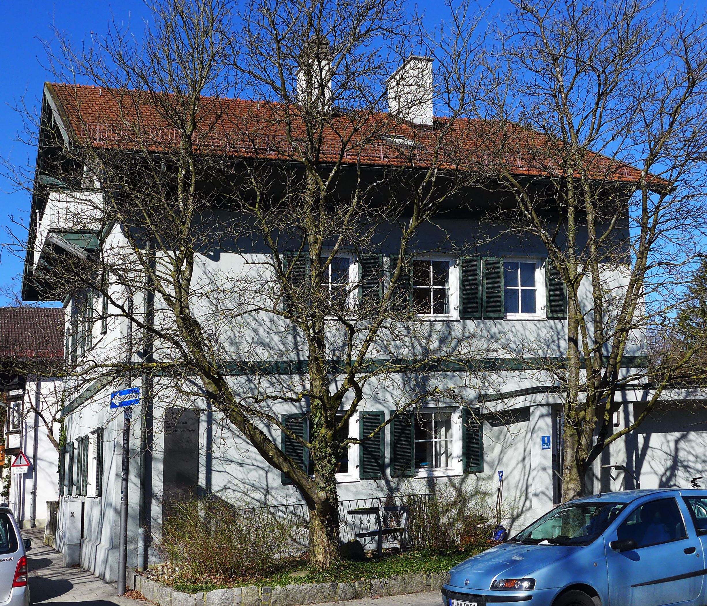 FritzReuterStr1 München